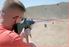 בעיית תיאום הכוונות: הקו האדום מייצג את קו הראייה של הכוונת, הקו הכחול את המשכו של הקנה. הקווים מצטלבים בנקודה אחת בלבד.